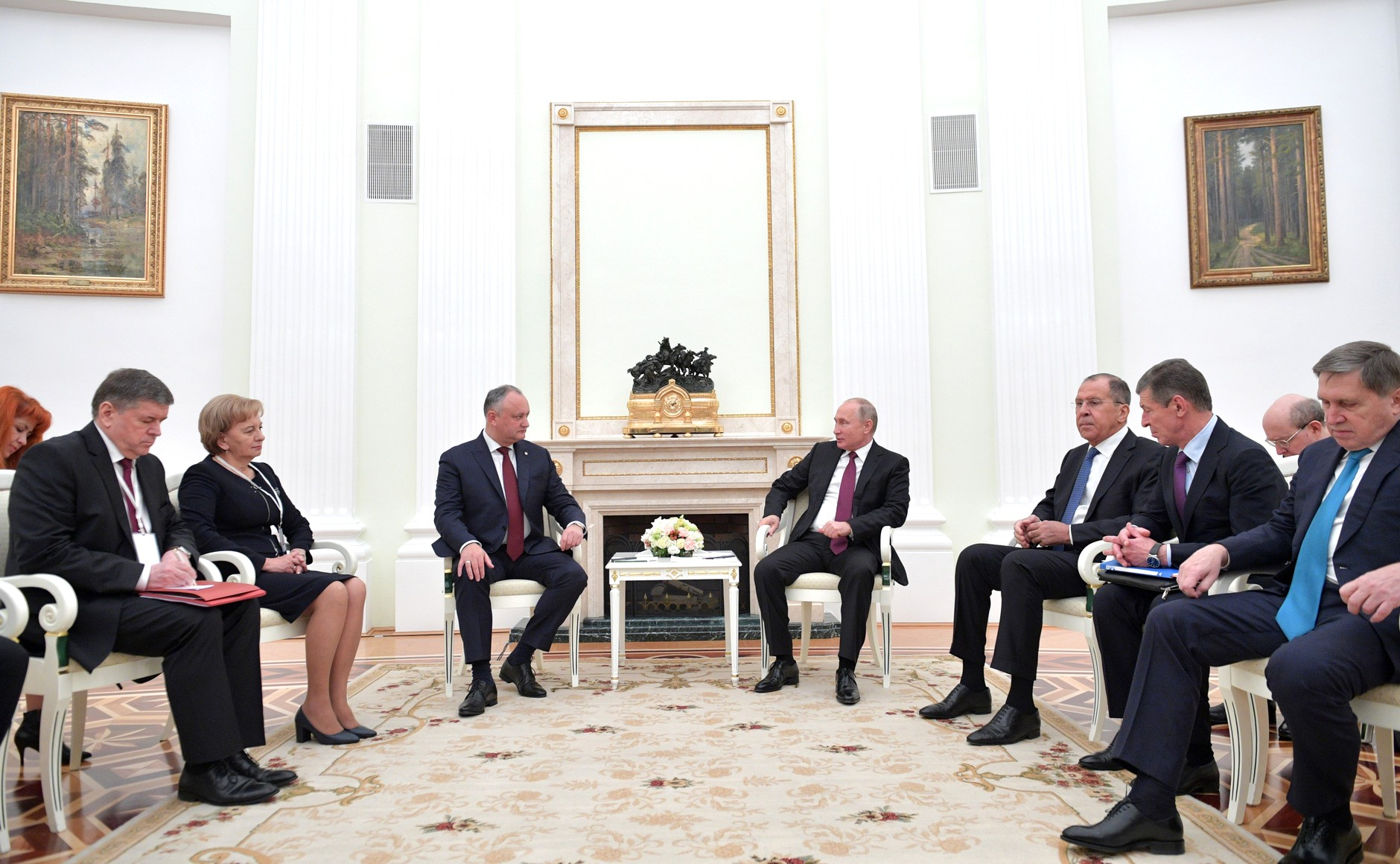 Встреча Президента России Владимира Путина с Президентом Молдовы Игорем Додоном